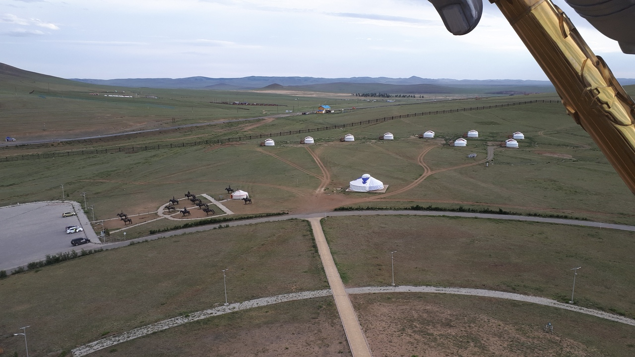 View of the theme park from the observation deck on the statue of Genghis Khan